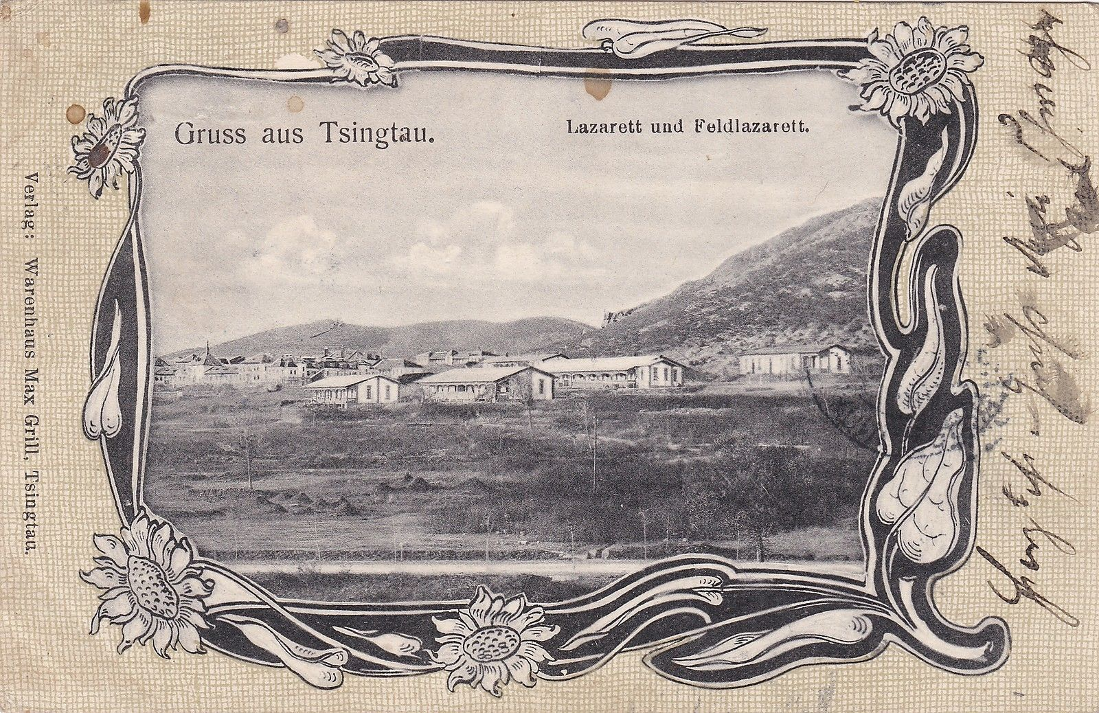 青岛德国野战医院